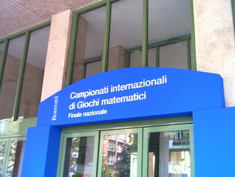 Ingresso di via Sarfatti dell'Università Bocconi a Milano in occasione dei campionati di matematica